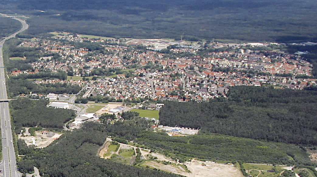 Schrägluftbild der bayerischen Gemeinde Feucht aus südlicher Richtung im Jahr 2001. Links im Bild ist die Autobahn 9, mittig im oberen Bilddrittel ist das Gelände der Fella-Werke zu erkennen.